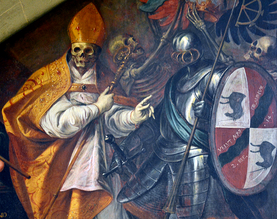 Vanitas Darstellung im Münster zu Konstanz